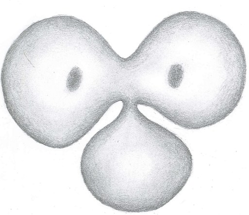 Estadio de tres celulas. Esquema realizado a partir de una imagen del desarrollo temprano de Dentalium que aparece en Developmental Biology de Scott Gilbert.